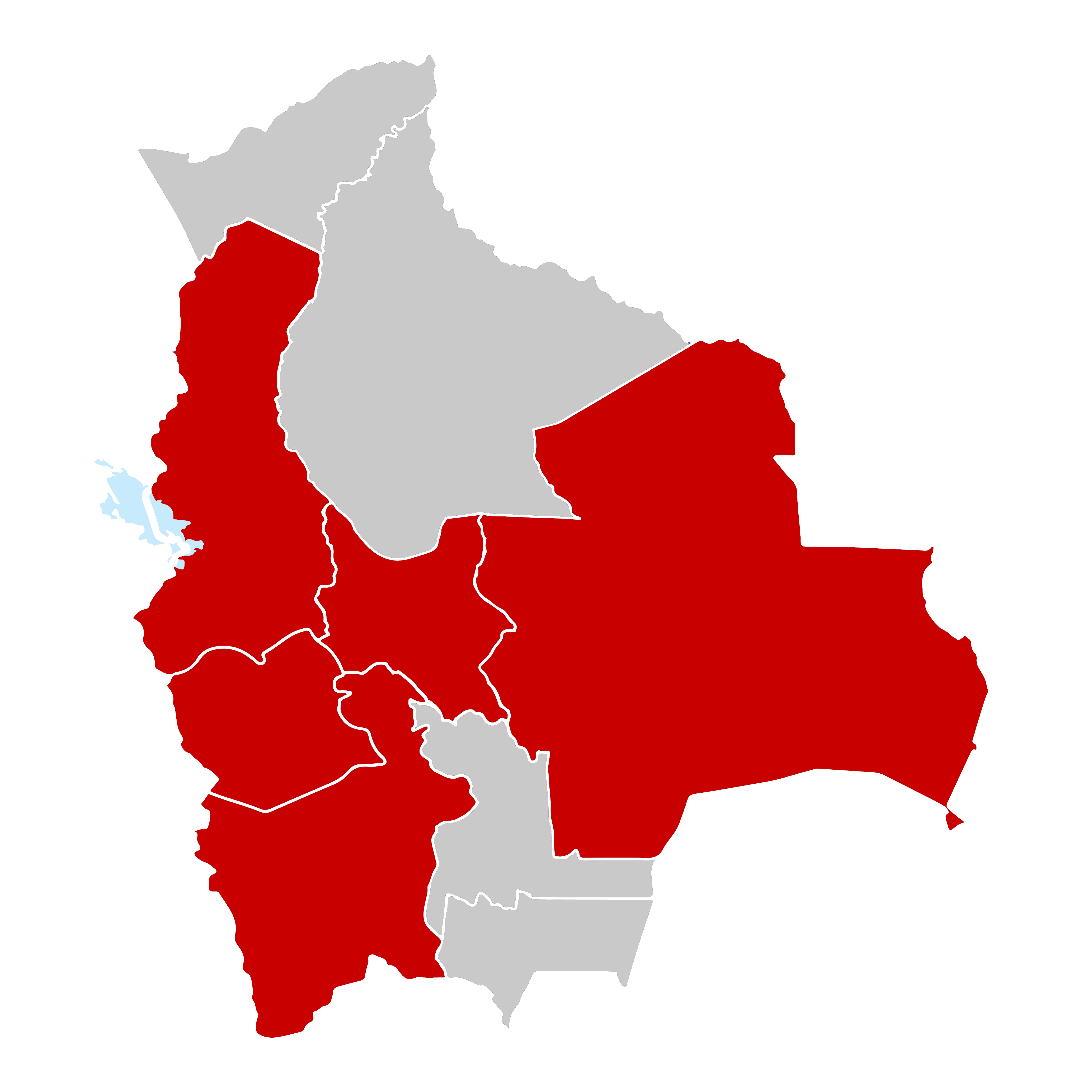 Epidemia de coronavirus de 2020 en Bolivia